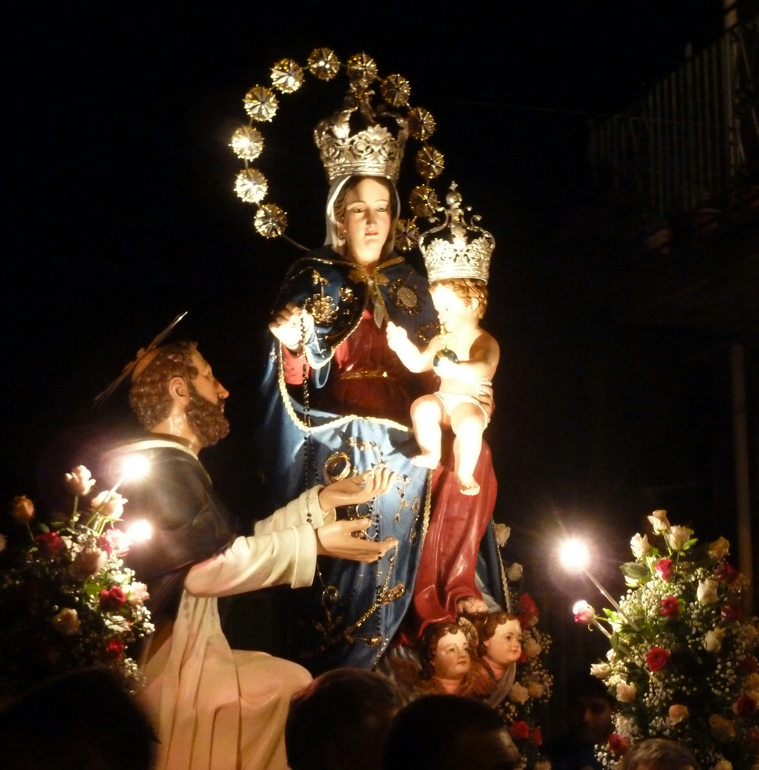 Statua della Patrona di Roccalumera.